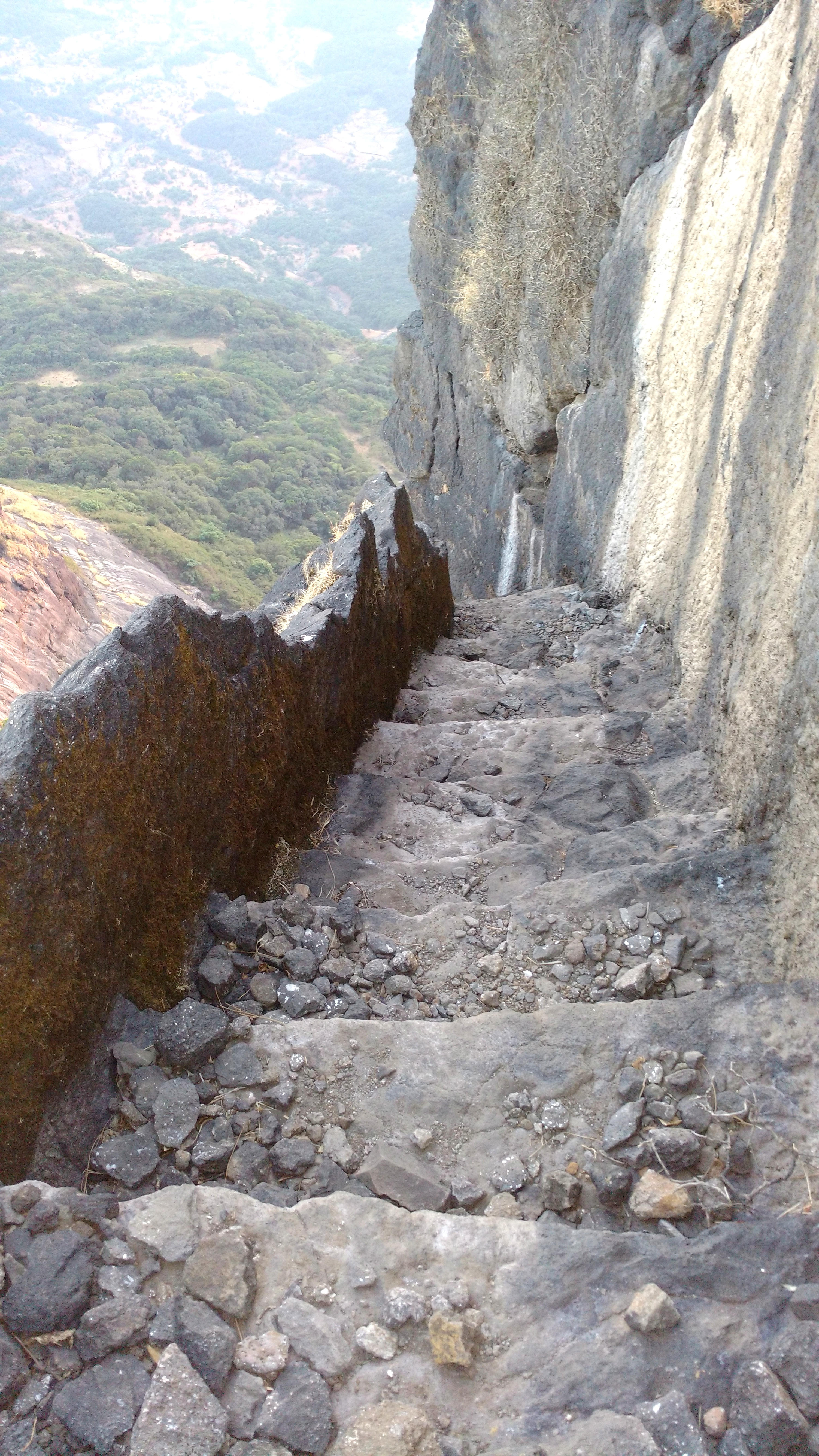 Madangad Fort ; pathways